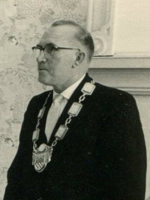 Oberbürgermeister der Stadt Iserlohn Fritz Rustemeyer (1898-1965) mit Amtskette